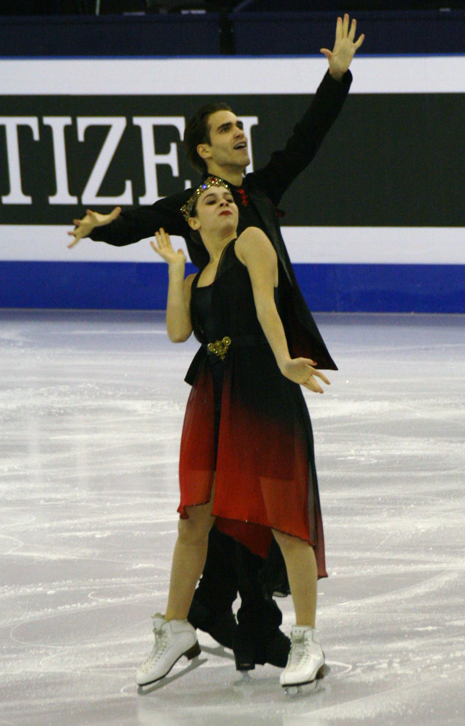 Бетина Попова и Юрий Власенко (Россия) на финале Гран-при по фигурному катанию среди юниоров 2015-2016.